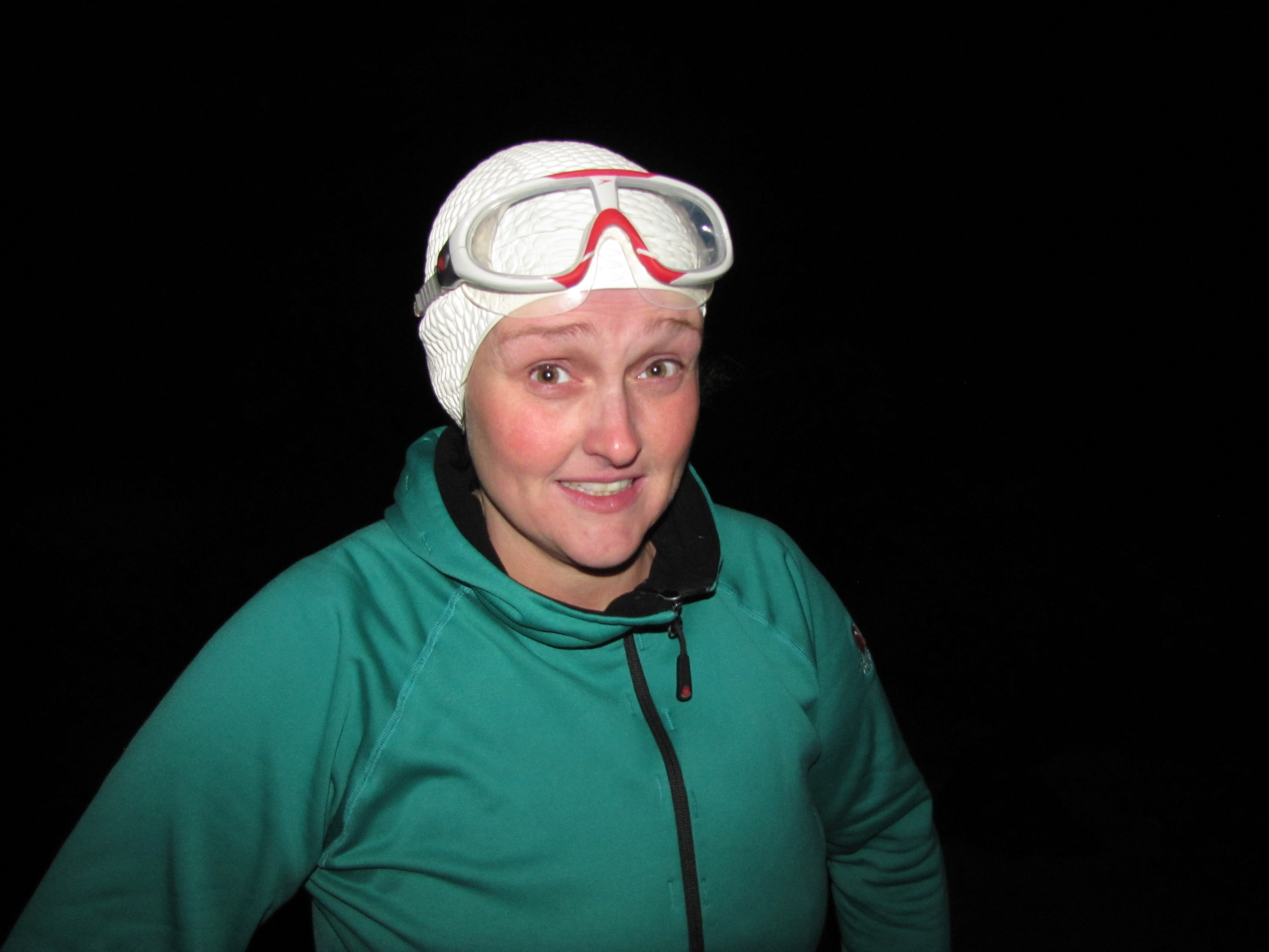 Sjósund